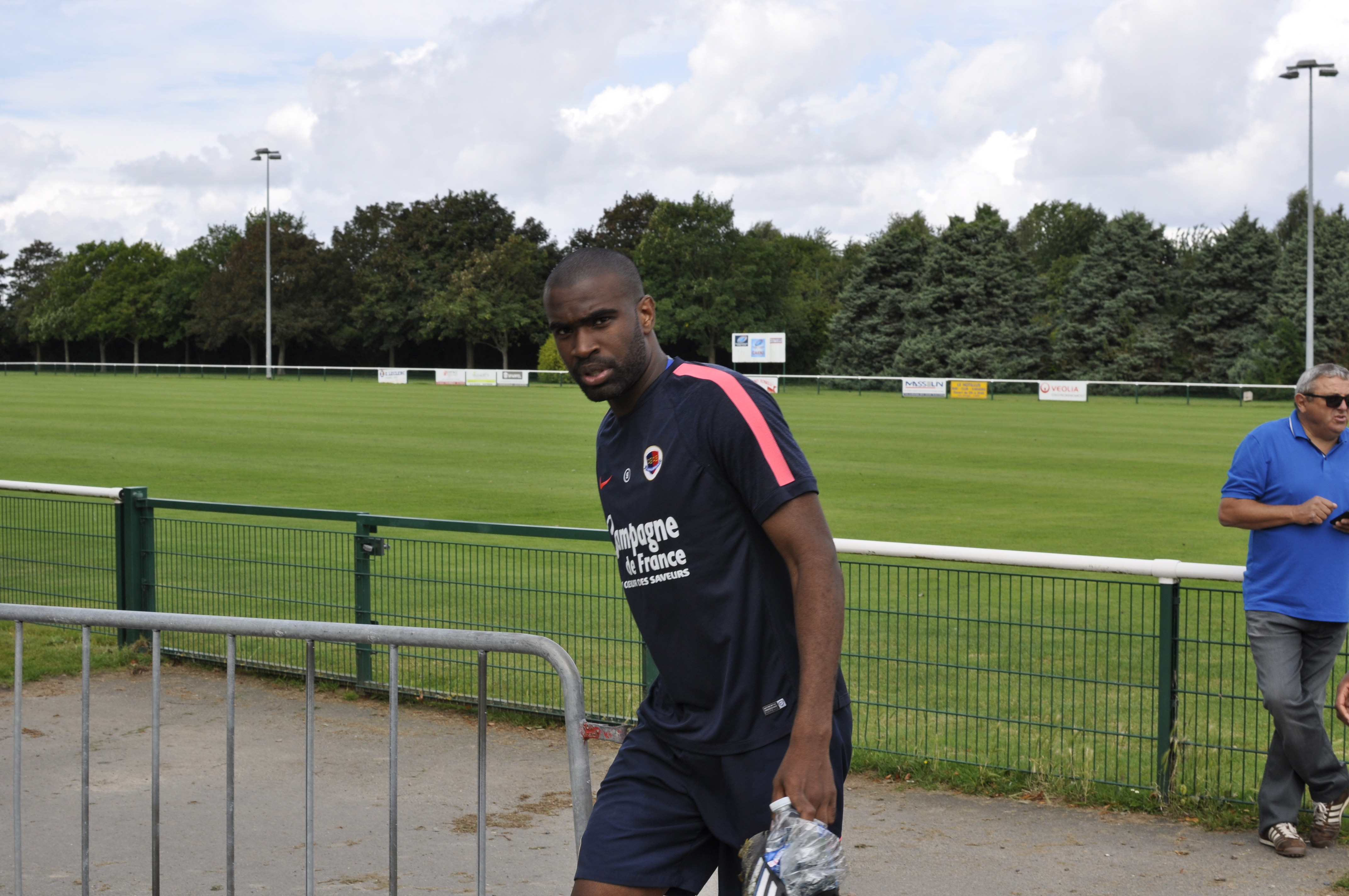 Sloan Privat à la sortie d'un entraînement du SM Caen